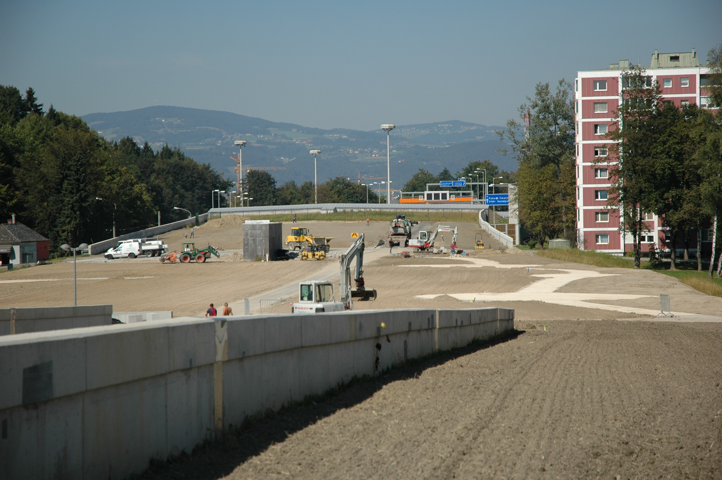 Bauarbeiten am Landschaftspark Bindermichl (auf der Einhausung der A7 Mühlkreisautobahn) in Linz, Oberösterreich.